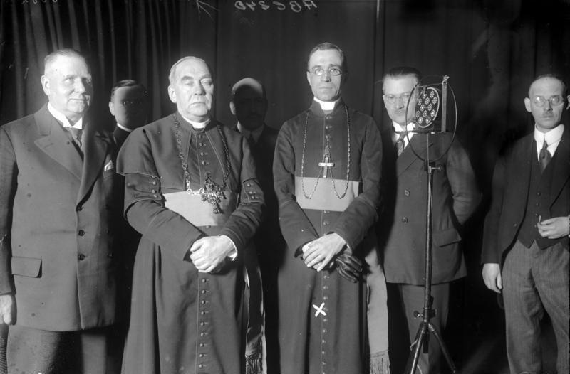 Der päpstliche Nuntius Pacelli(X) und der Weihbischoff von Berlin Deitmer, beim Besuch der Radio-Sendestation im Vox-Haus in Berlin.